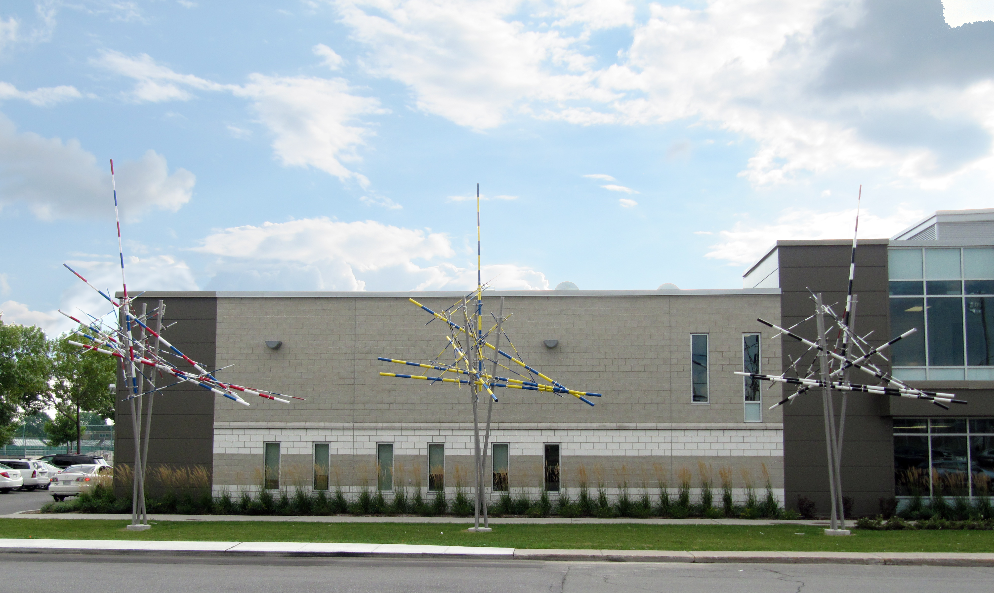 Centre sportif Léonard-Grondin (Granby, Québec) - sculptures situées devant la bâtisse